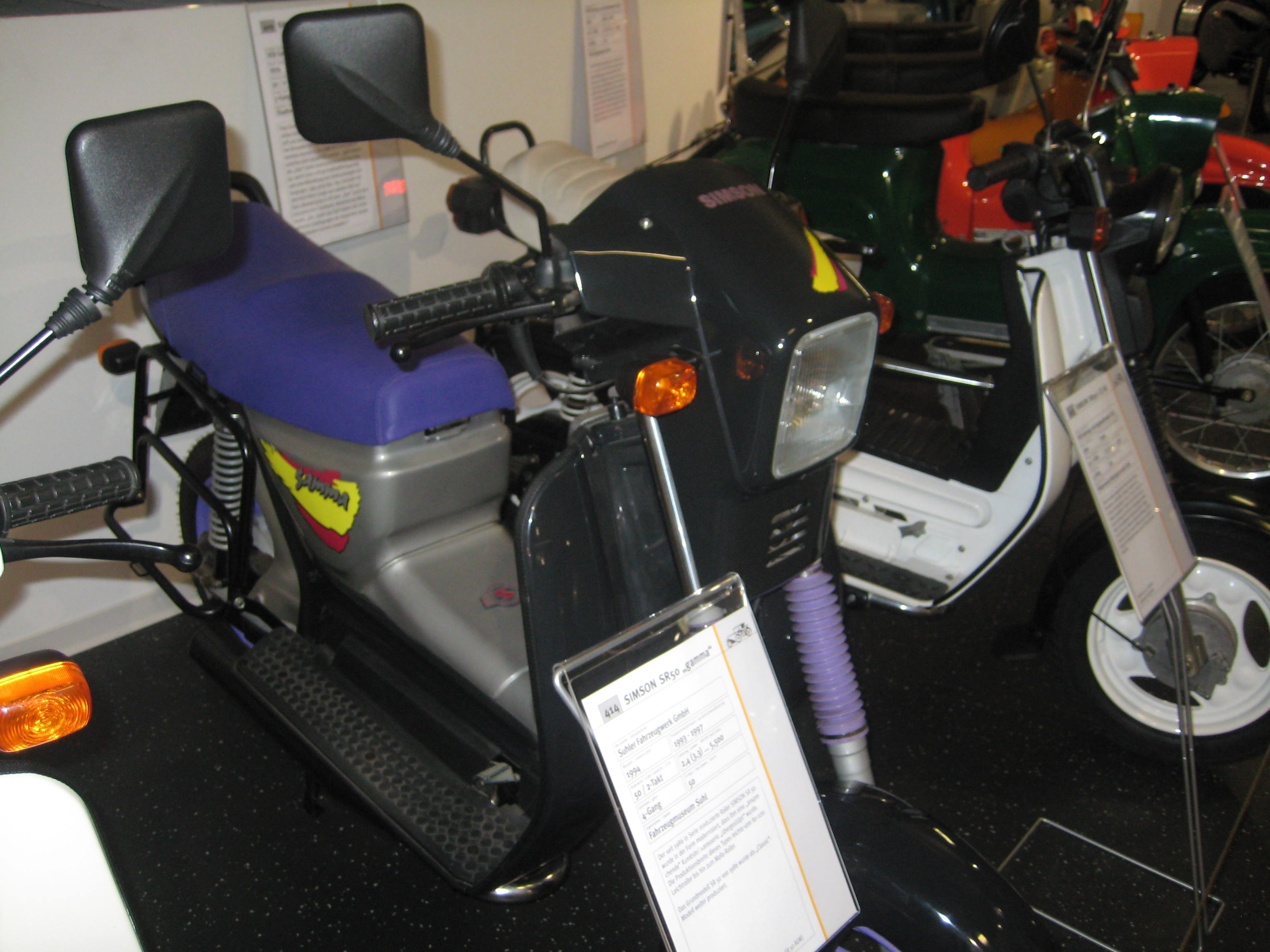 Zdjęcie przedstawiające skuter Simson SR 50 Gamma będący eksponatem w Fahrzeugmuseum Suhl.